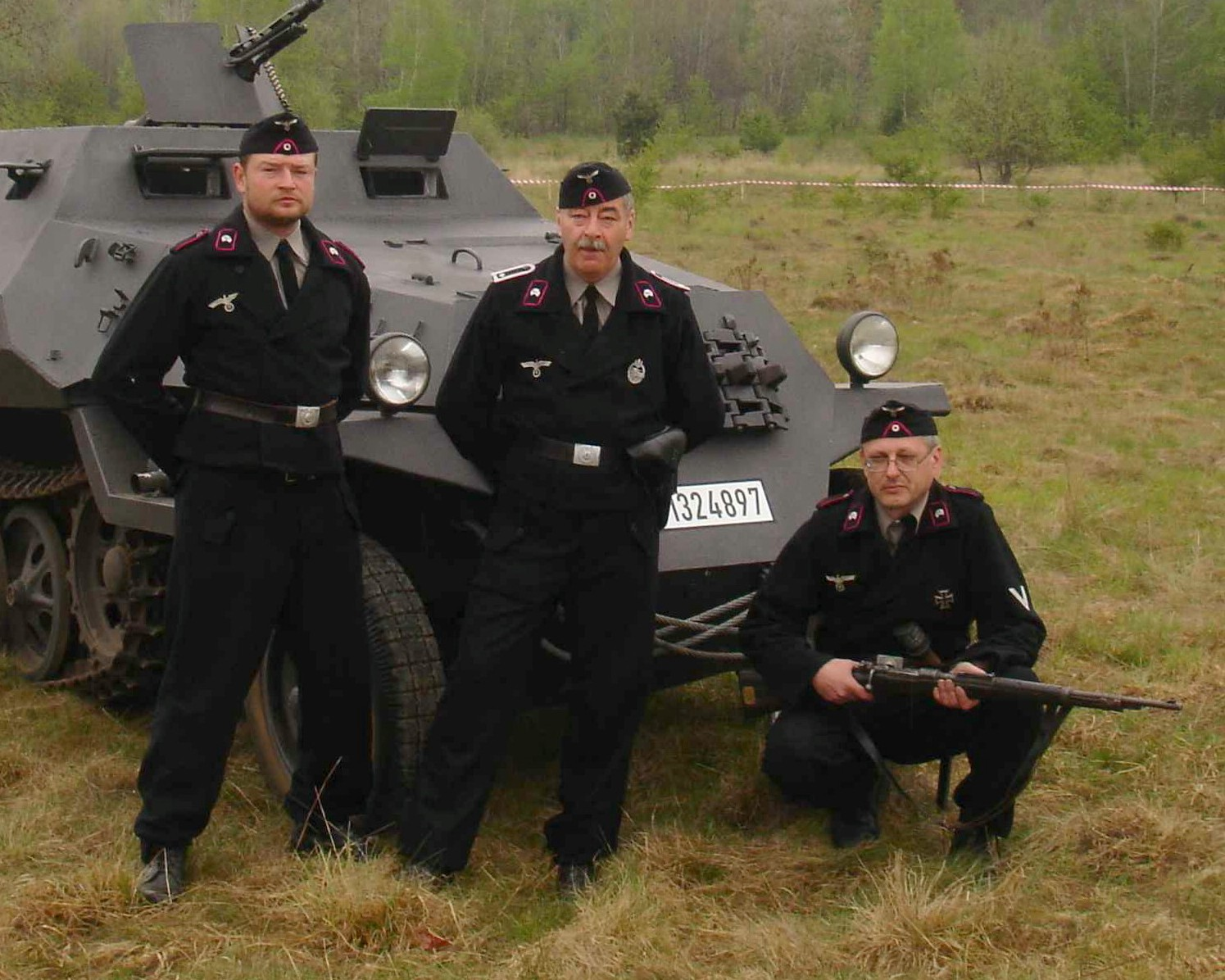 Panzersoldaten in Sonderbekleidung vor einem Schützenpanzerwagen der deutschen Wehrmacht.